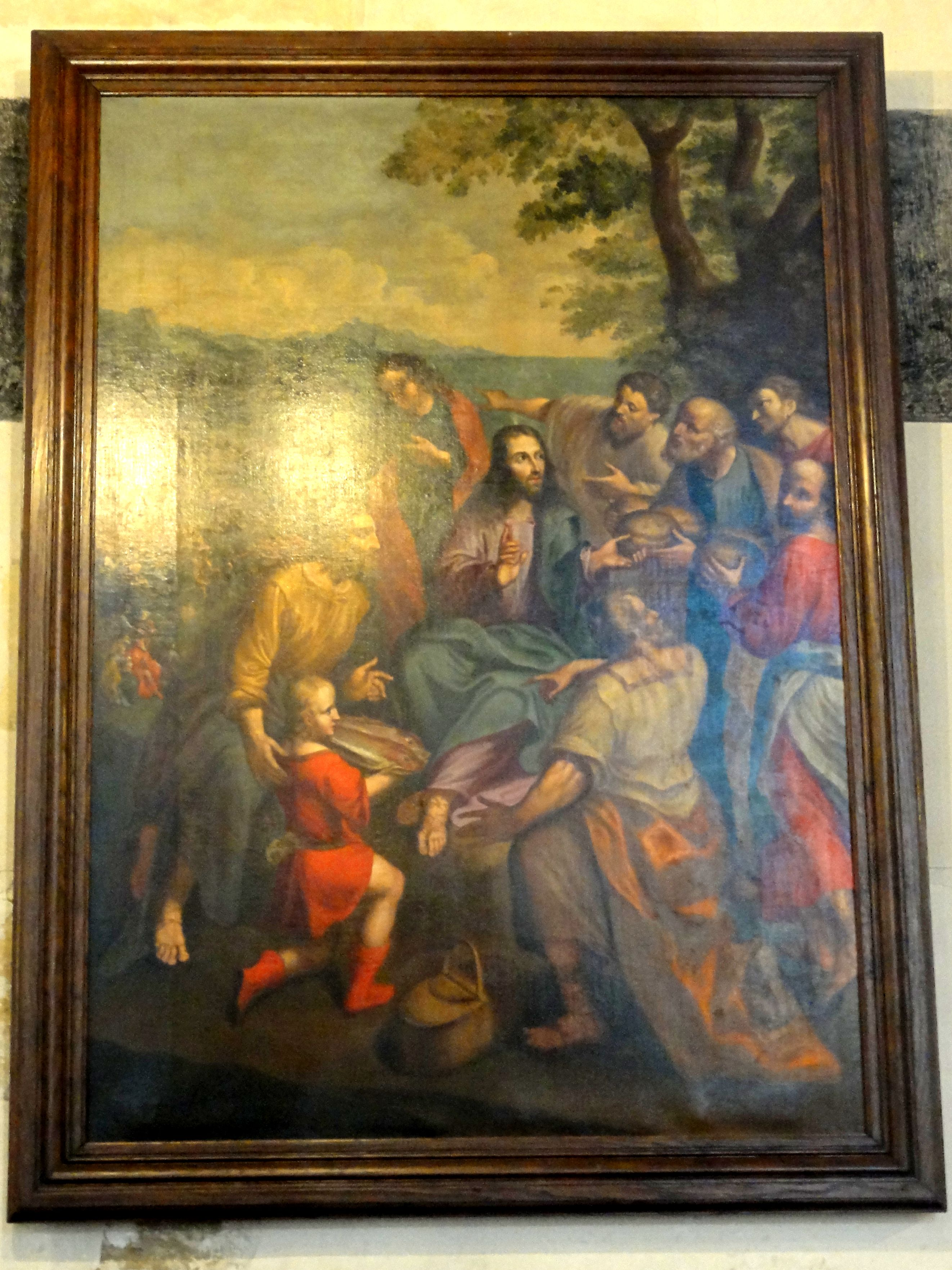 Tableau - la Multiplication des pains et des poissons.